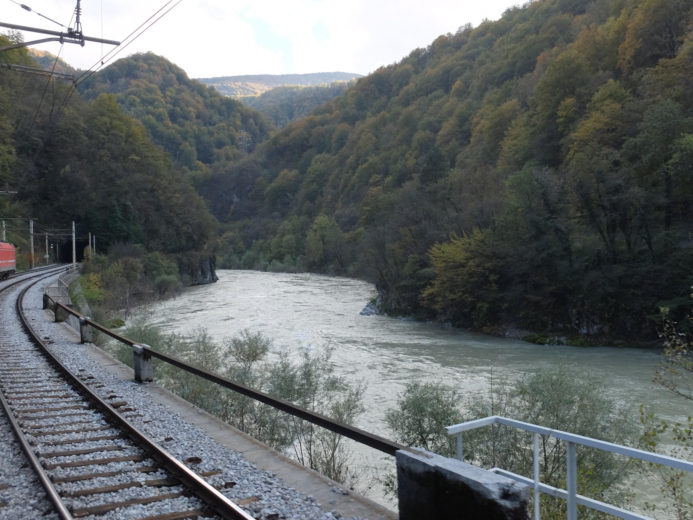 Save zwischen Trbovlje und Zidani Most, im Hintergrund Nordportal des Tunnels Ringo, 130 Meter lang